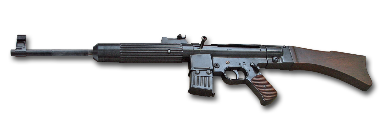 Sturmgewehr 45